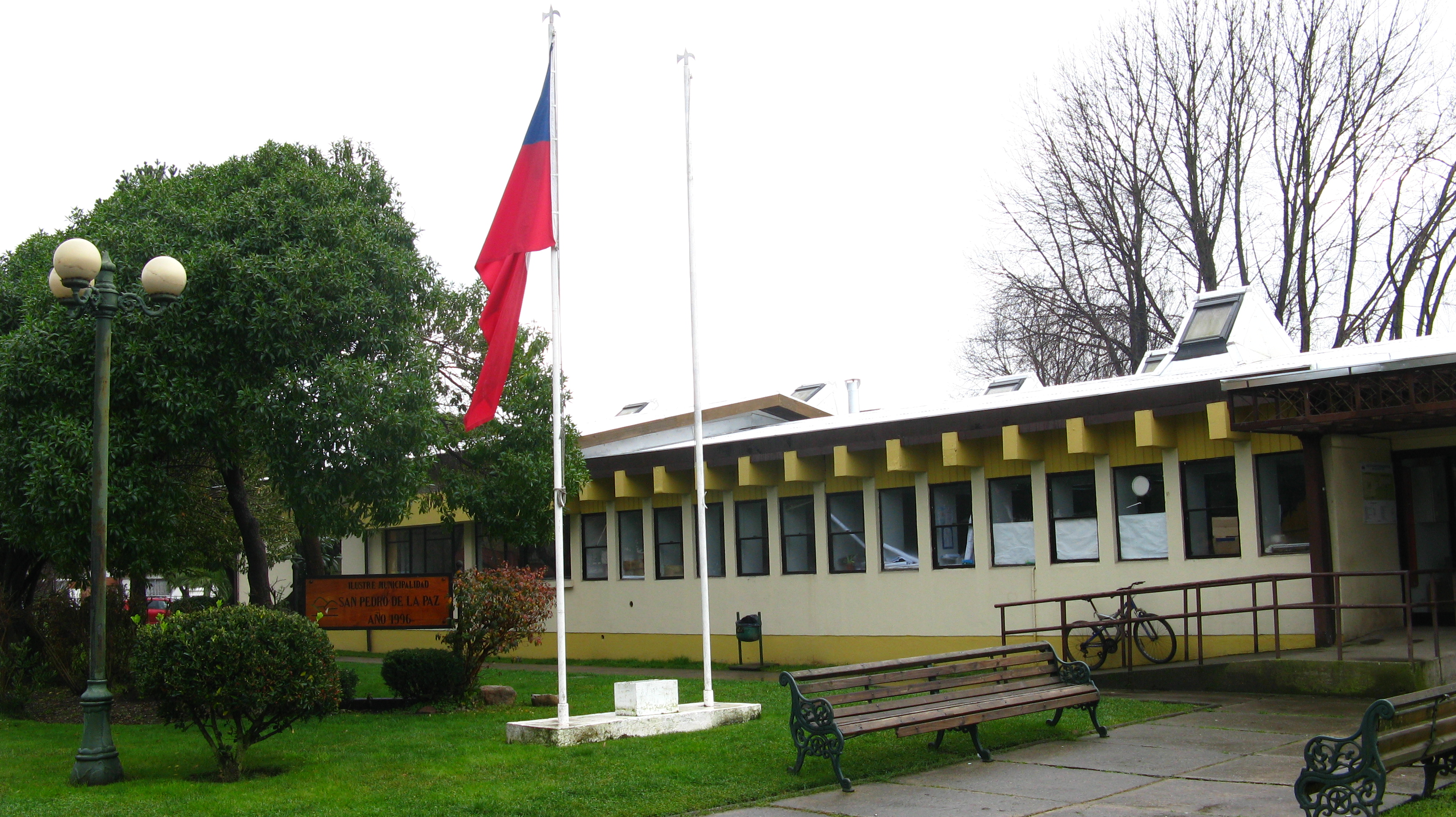 Ilustre Municipalidad de San Pedro de la Paz Provincia de Concepción, Chile Julio de 2012